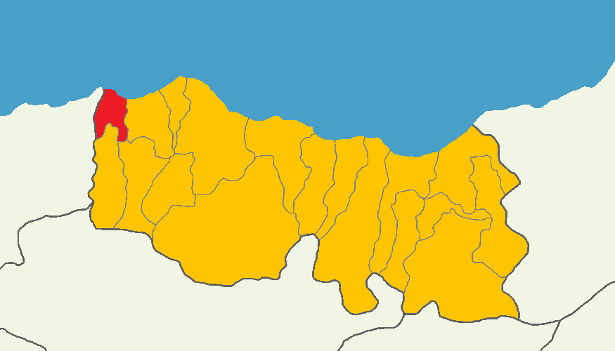 Trabzon'da 2014 Türkiye cumhurbaşkanlığı seçimi